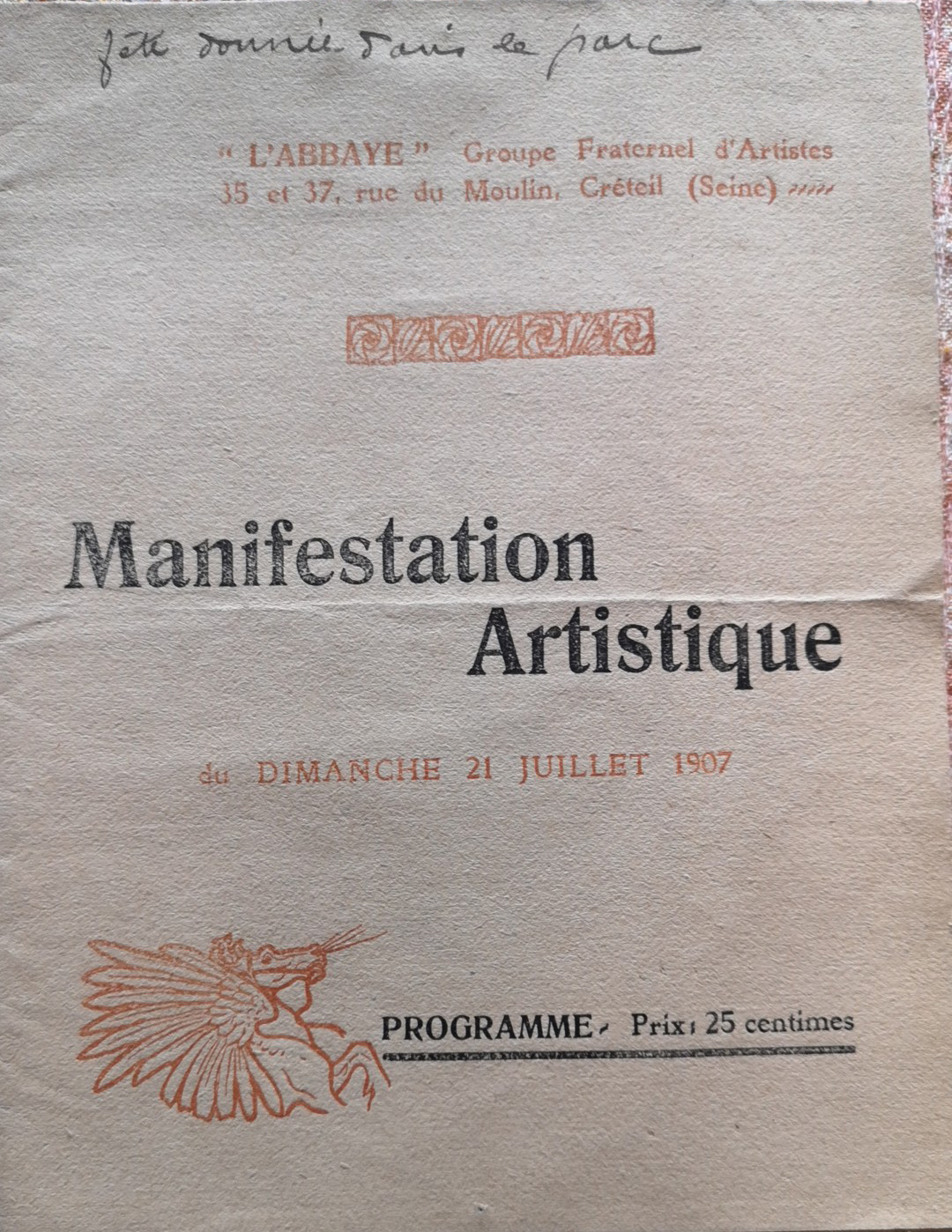 Couverture du programme de la 1ere exposition de l'Abbaye de Créteil